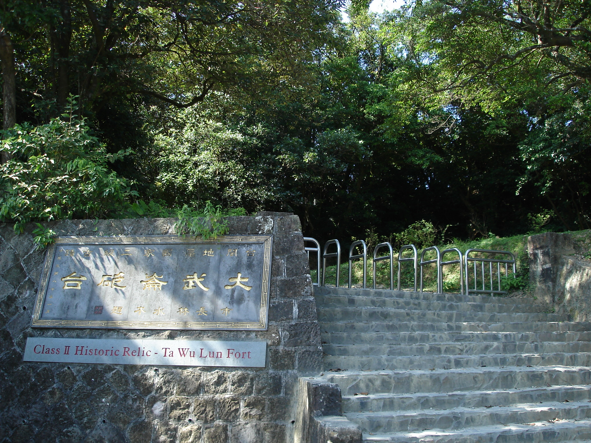 Dawulun Fort